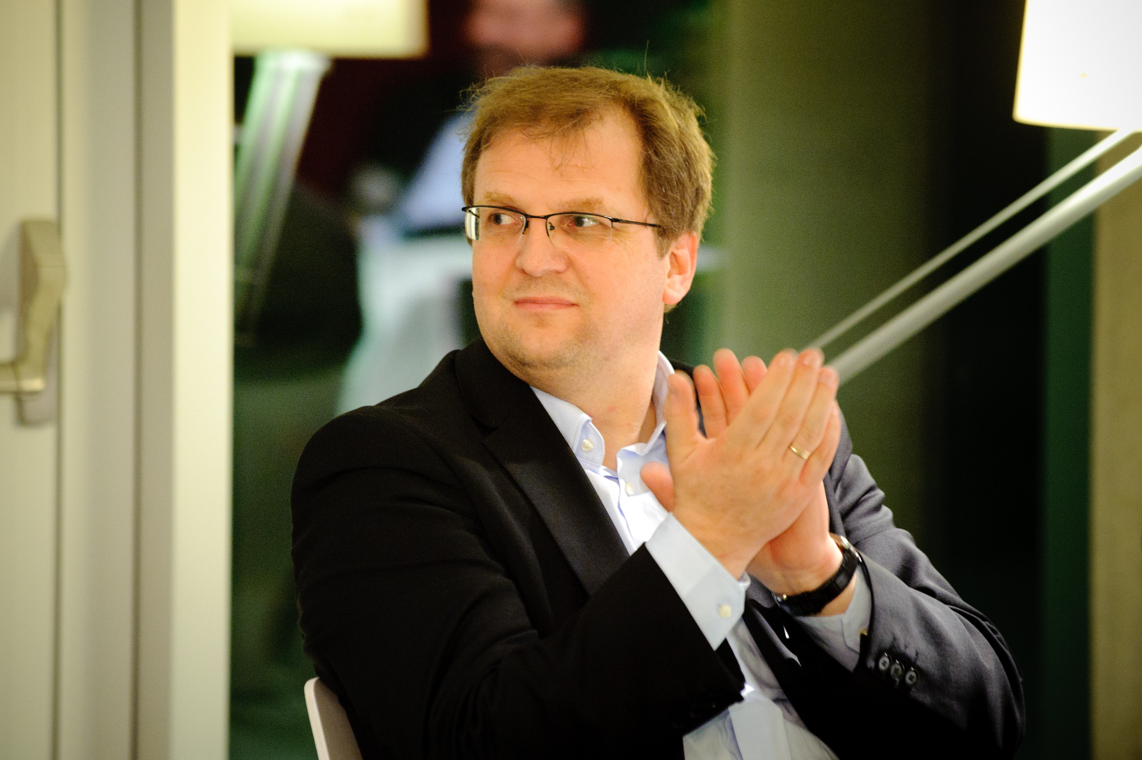 Prof. Jörg Althammer (Katholische Universität Eichstätt-Ingoldstadt) Foto: CC-BY-SA Stephan Röhl /